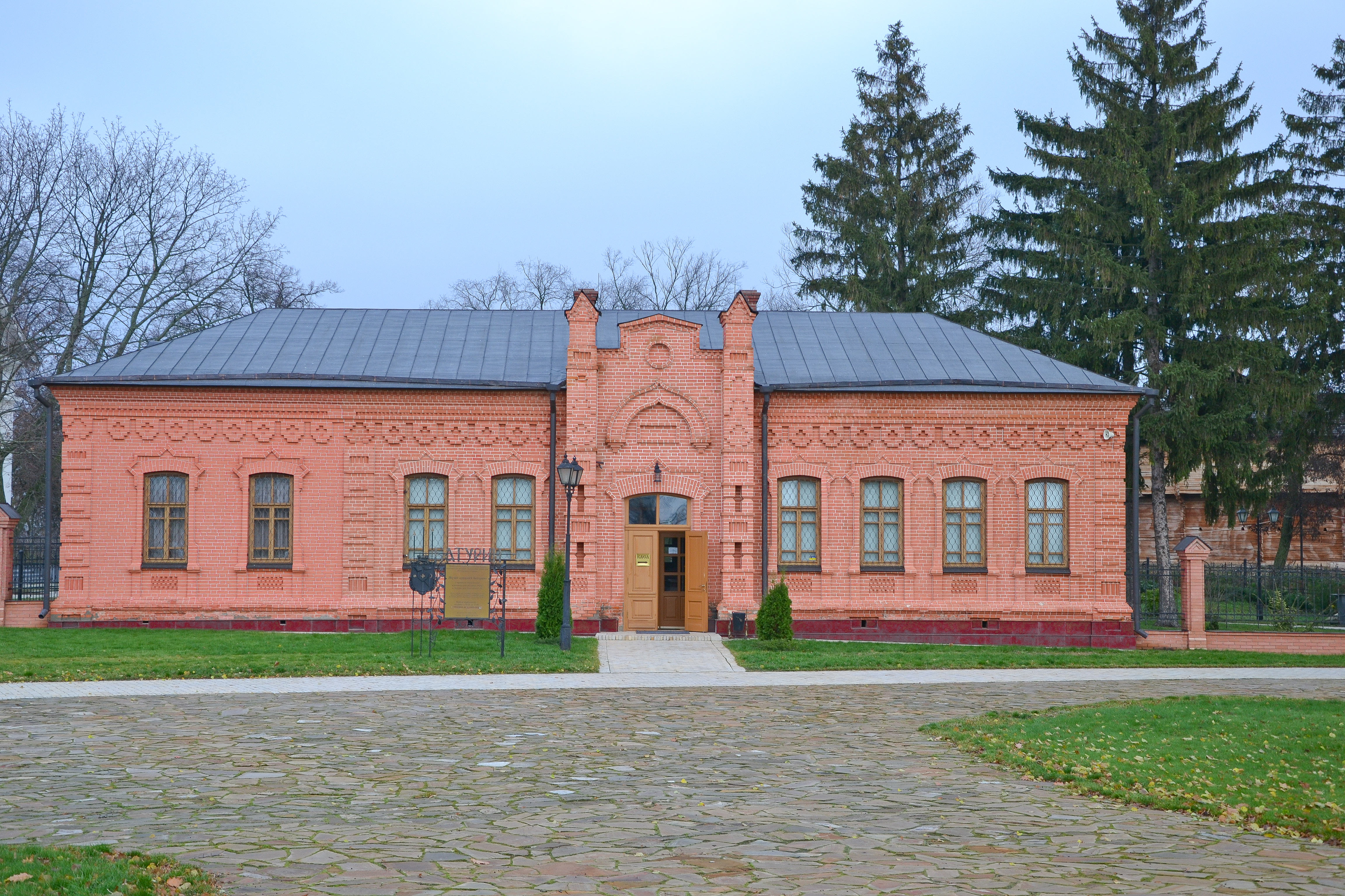 Воскресенська церковно-парафіяльна школа, Батурин, вул. Партизанська, 10